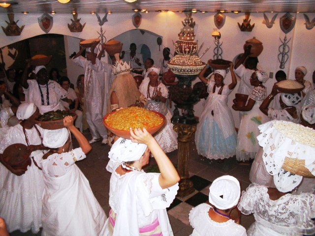 Obaluaye. Sapata no Olubaje Orossi